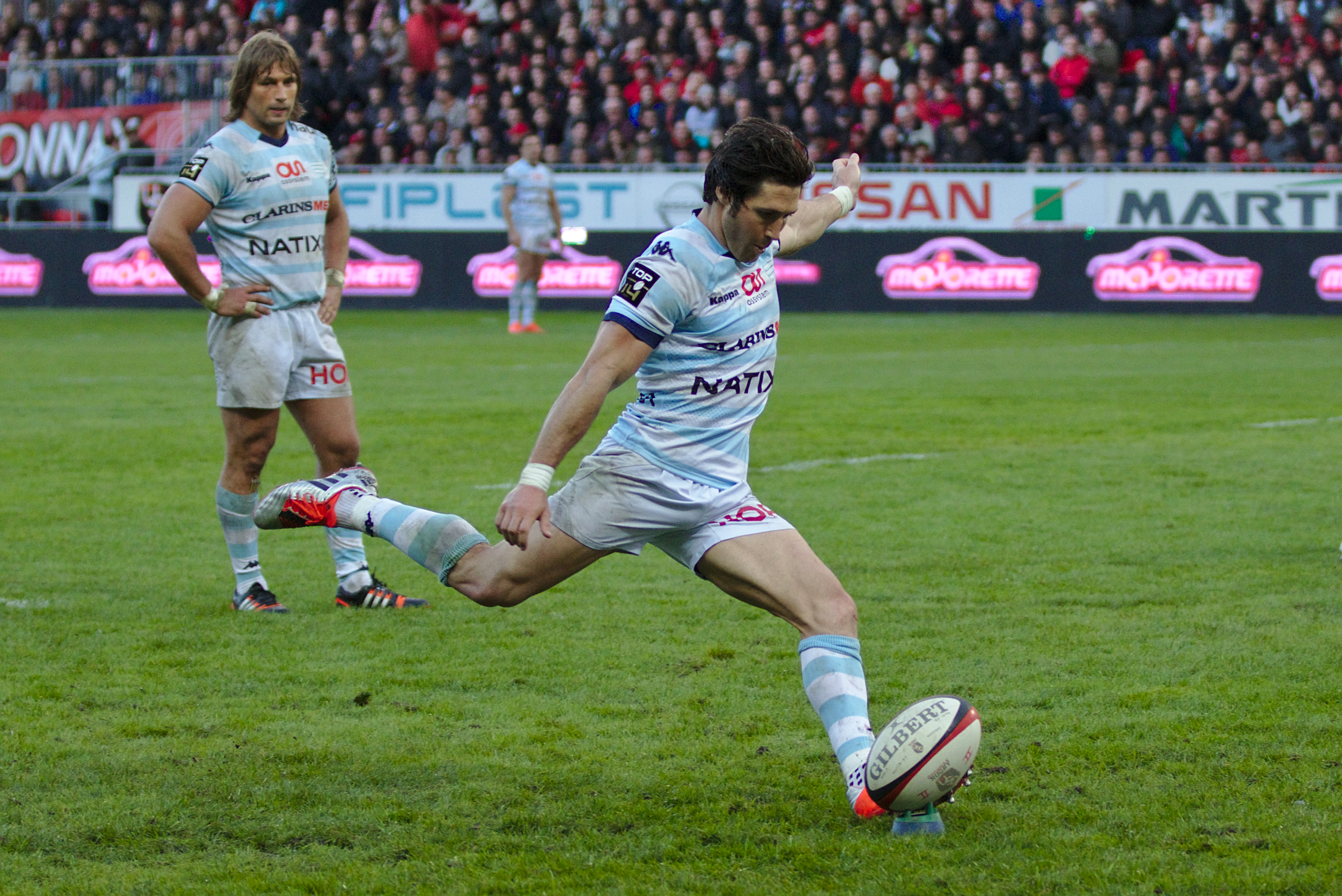 USO - RM92 - 20150425